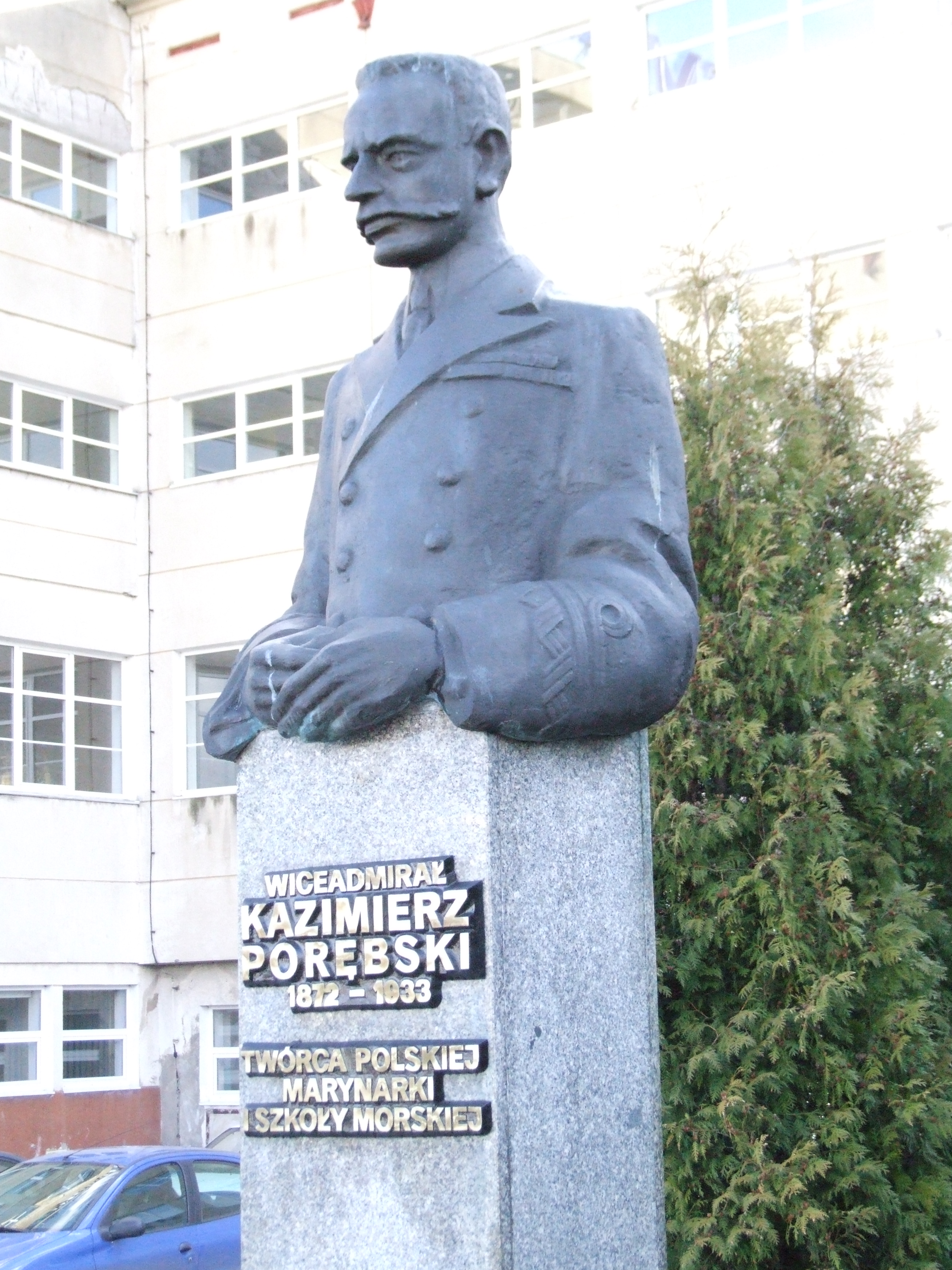 Pomnik wiceadmirała Kazimierza Porębskiego